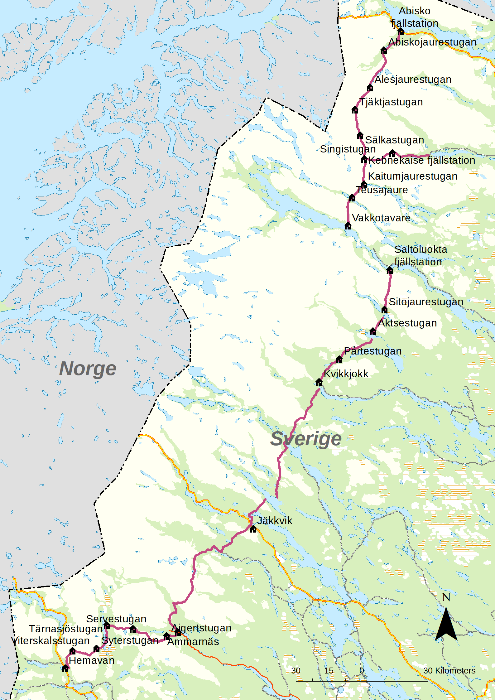 Karta över Kungsleden.